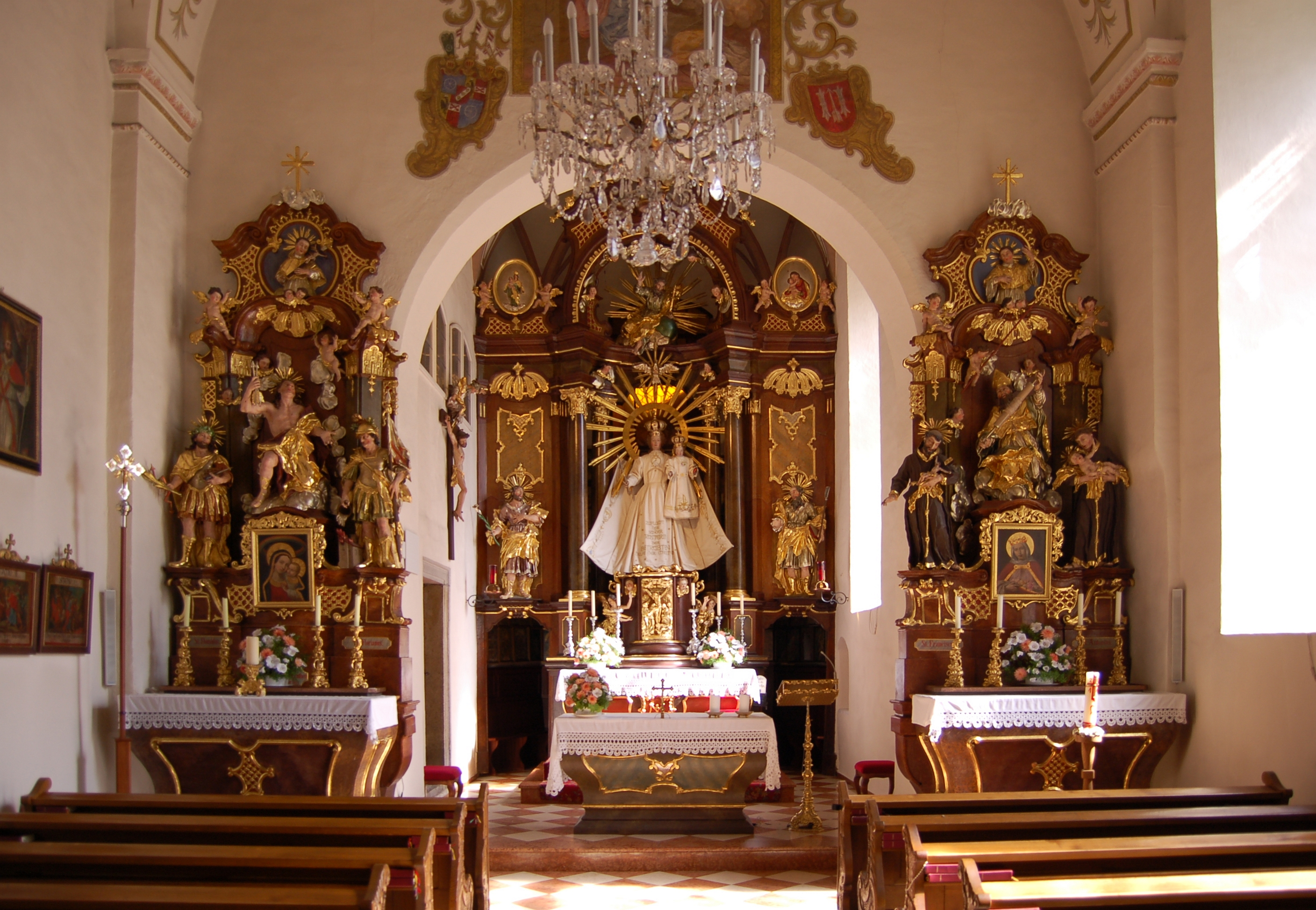 Die Wahlfahrtskirche Maria Trost in Berg bei Rohrbach (Bezirk Rohrbach, Oberösterreich) geht vermutlich auf eine Kapelle der mittelalterlichen Burganlage zurück. Der heutige, dreijochige Saalbau entstand im gotischen Stil, erfuhr jedoch 1645/55 einen Umbau und wurde barockisiert. Der Hochaltar mit einem frühbarocken Gnadenbild der Maria mit Kind (1656) stammt aus der Mitte des 18. Jahrhunderts, die Seitenaltäre mit Darstellungen von Heiligen aus der Zeit um 1740.